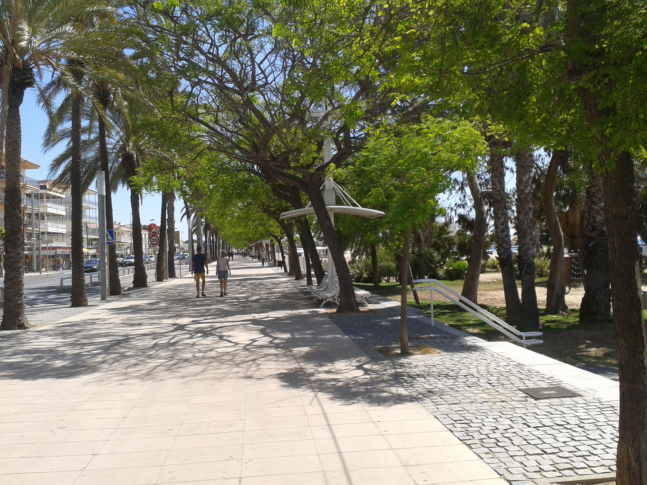 vista del paseo maritimo de Levante - Avenida Diputación - Cambrils.